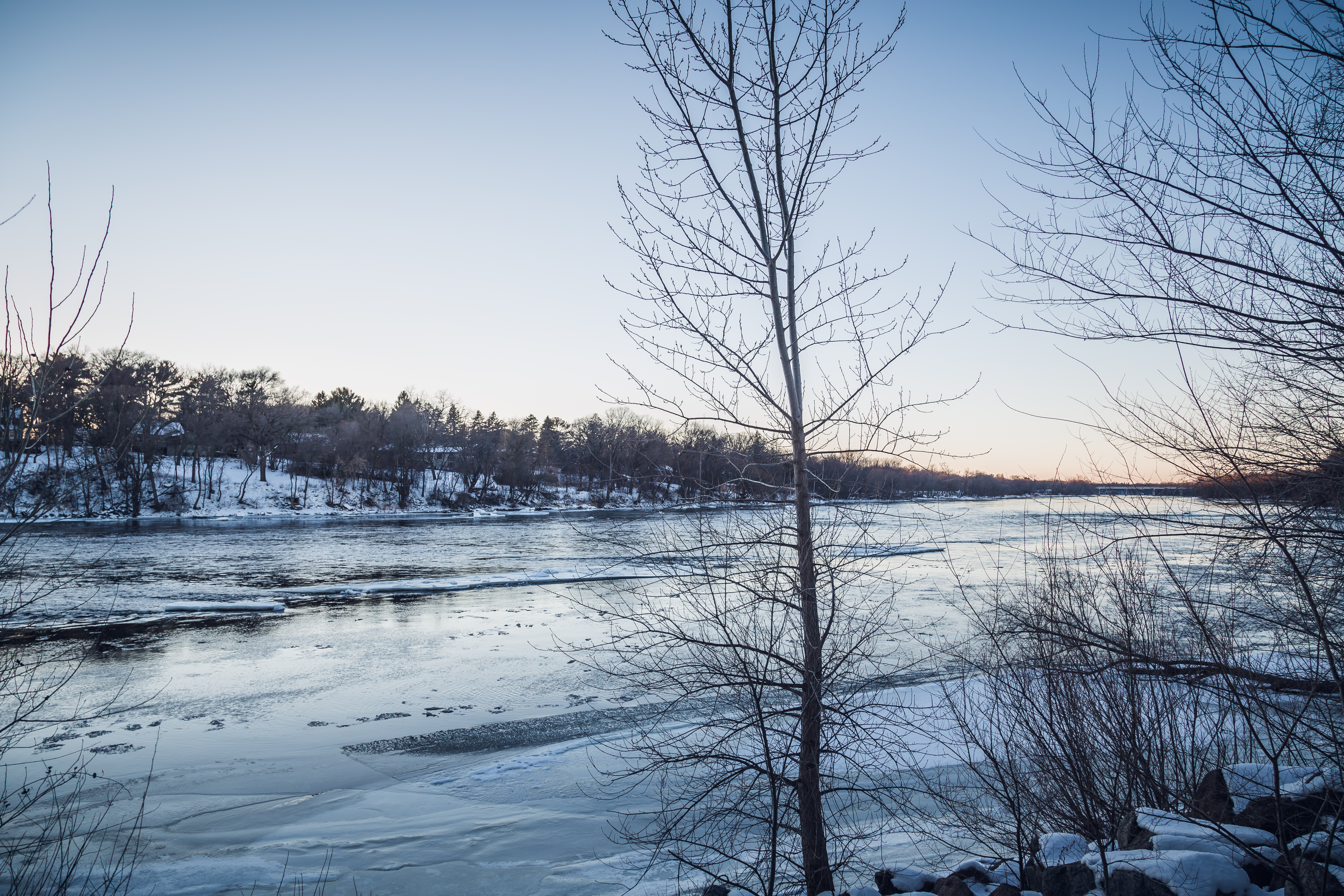 Saint Cloud / Sauk Rapids, Minnesota